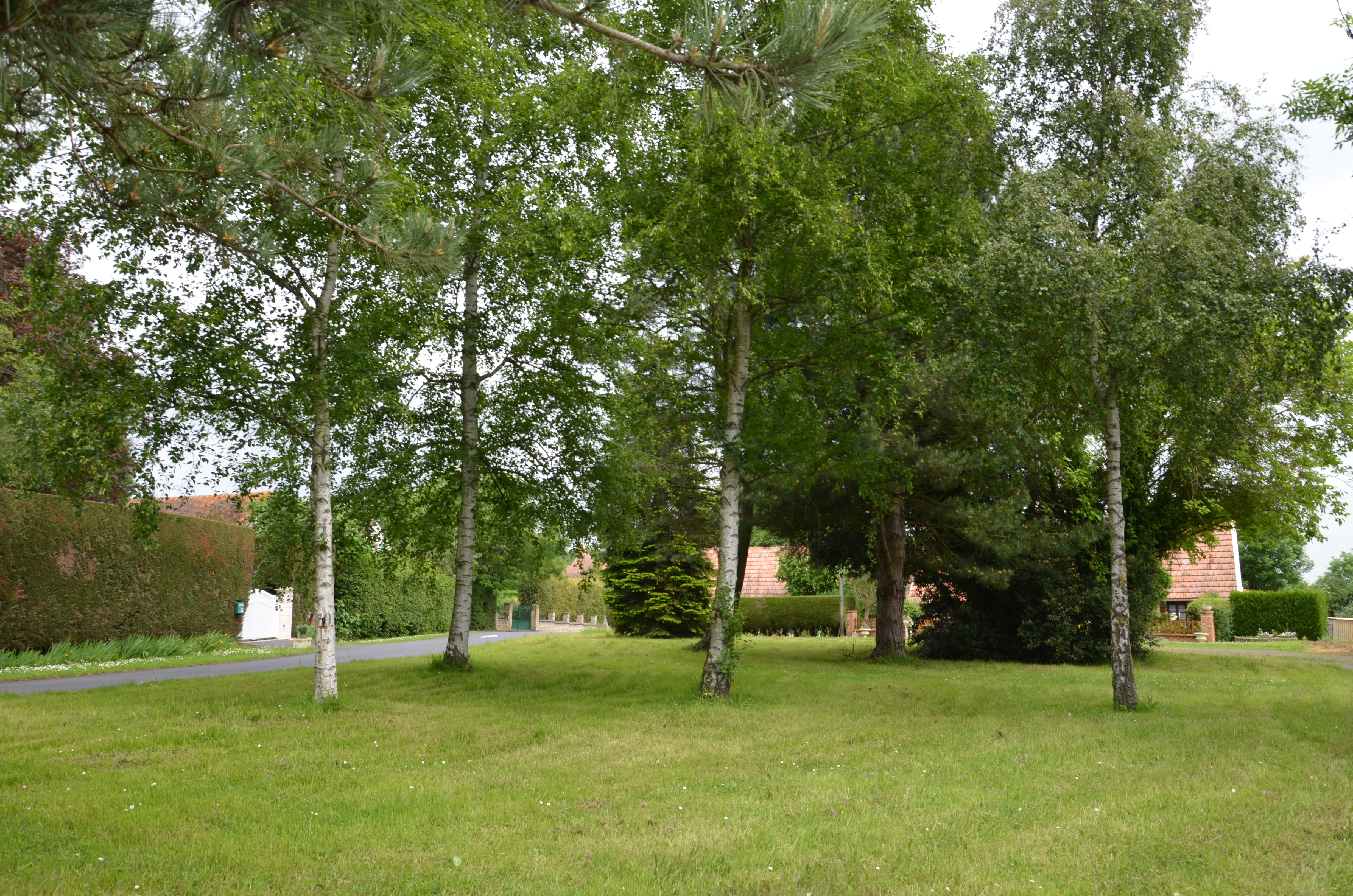 Lieu-dit les Bruyères de Calleville, à Janville.